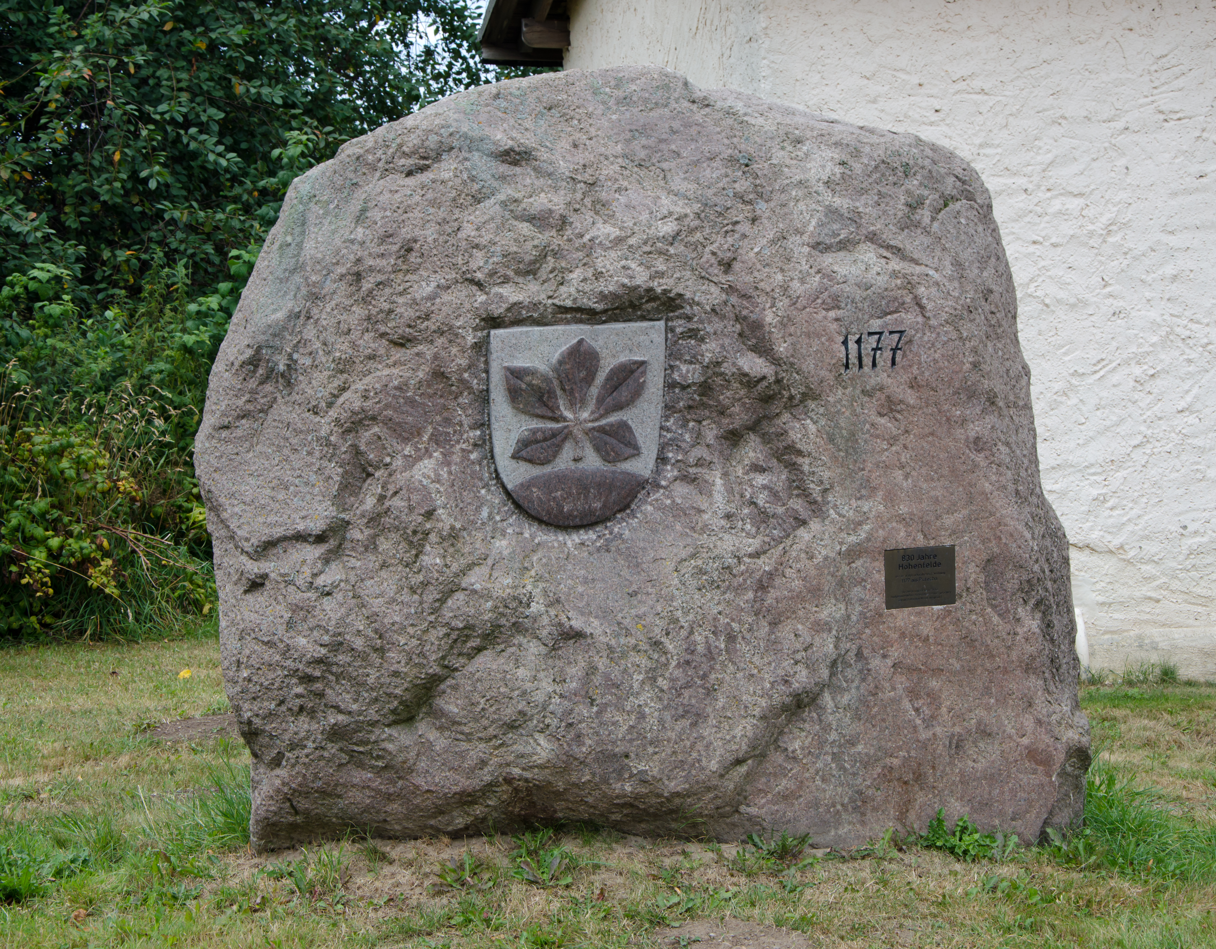 Hohenfelde Findling 830 Jahre